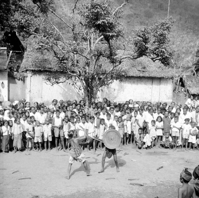 Negatief. Tijdens de prikkelkrijg (Prang duri) tonen jonge mannen hun mannelijke karakter tegenover de gemeenschap te Tenganan, Oost-Bali